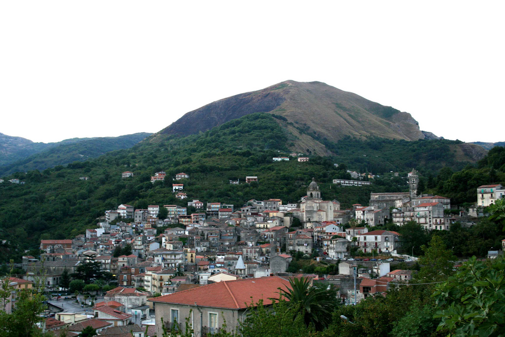 tortorici